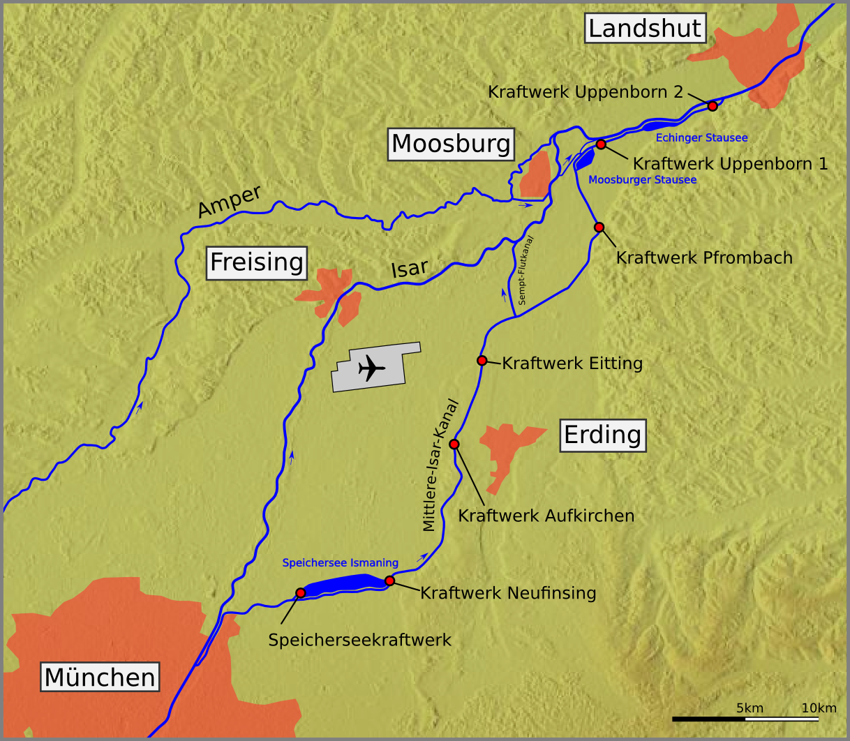 Karte des Mittlere-Isar-Kanals